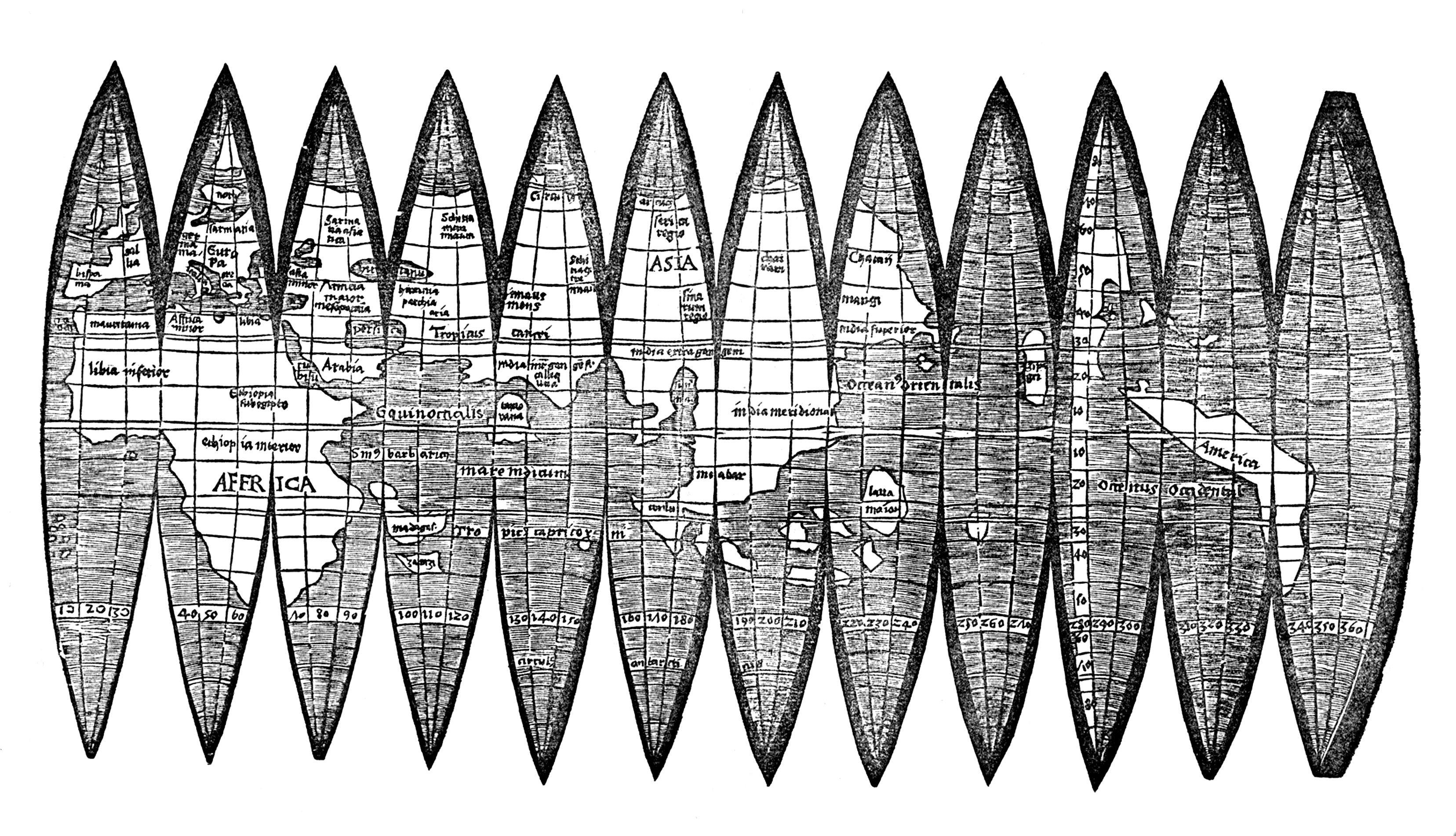 Segmentsatz für einen Erdglobus von Martin Waldseemüller (um 1470-1522). Frühester gedruckter Erdglobus, der die Neue Welt kartographisch wiedergibt und den Namen „America“ verwendet.